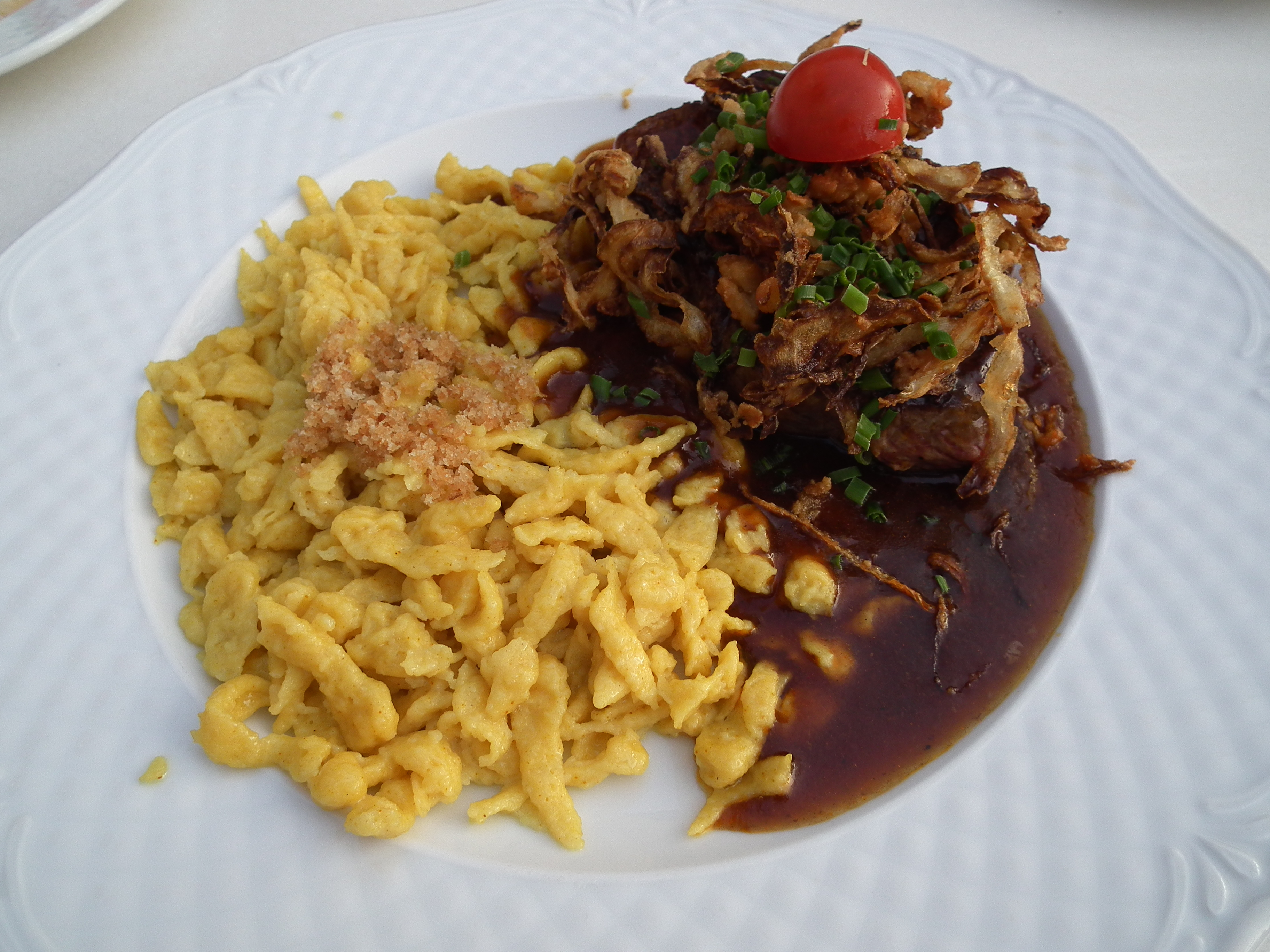 Zwiebelrostbraten mit Spätzle, zubereitet in Oberschwaben (Baden-Württemberg, Deutschland)